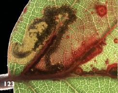 Ectoedemia erythrogenella larva